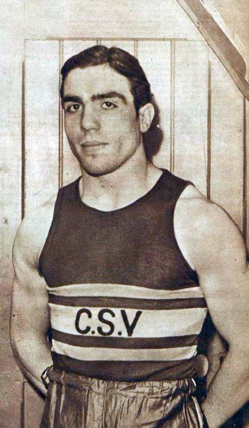 Jean Despeaux, champion olympique des poids moyens (JO de 1936, Deutschlandhalle).